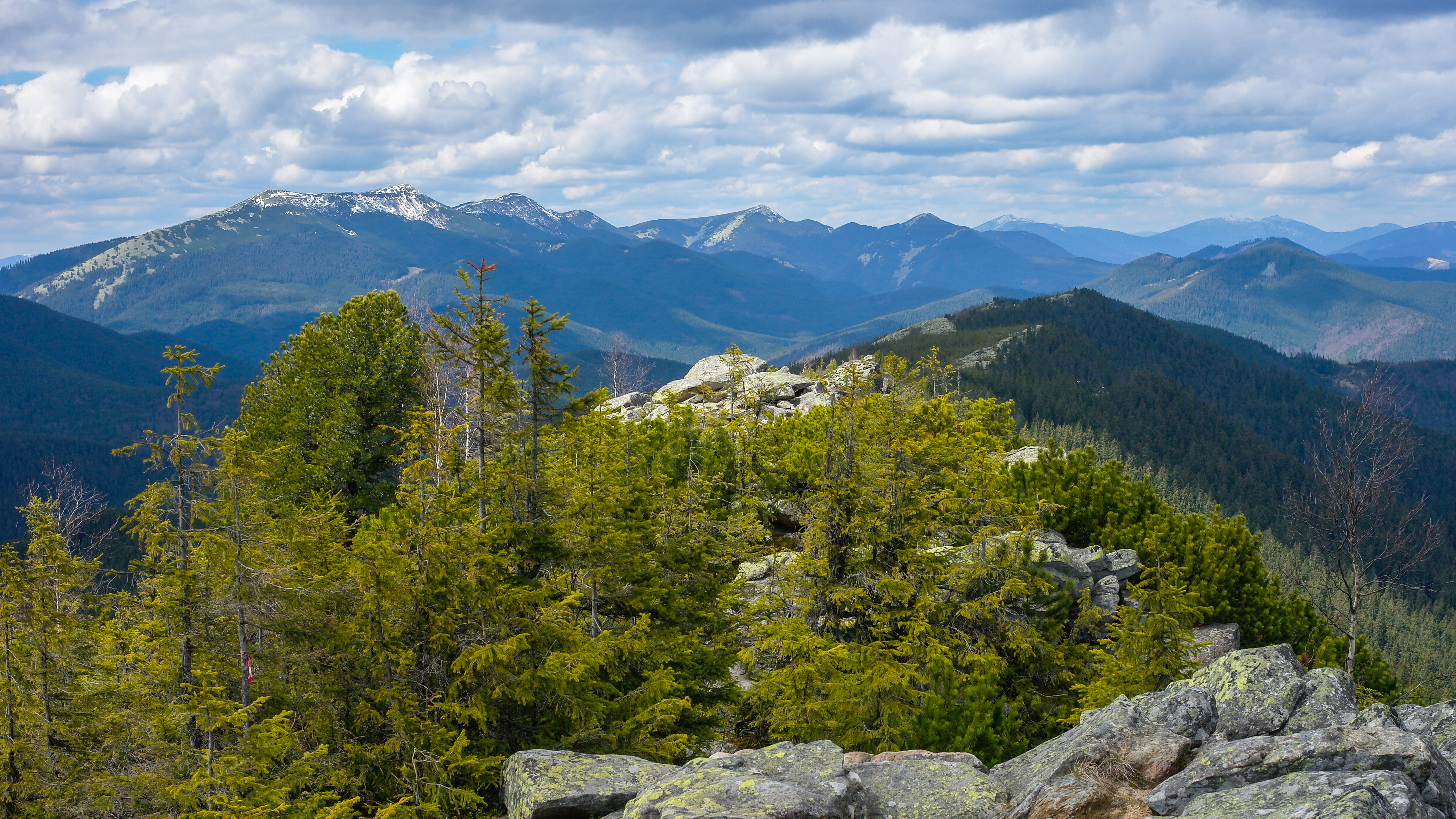 Горгани, Довбушанка (перші дві зліва засніжені вершини на горизонті). Фото, ймовірно, зроблене з Явірника (хребет)